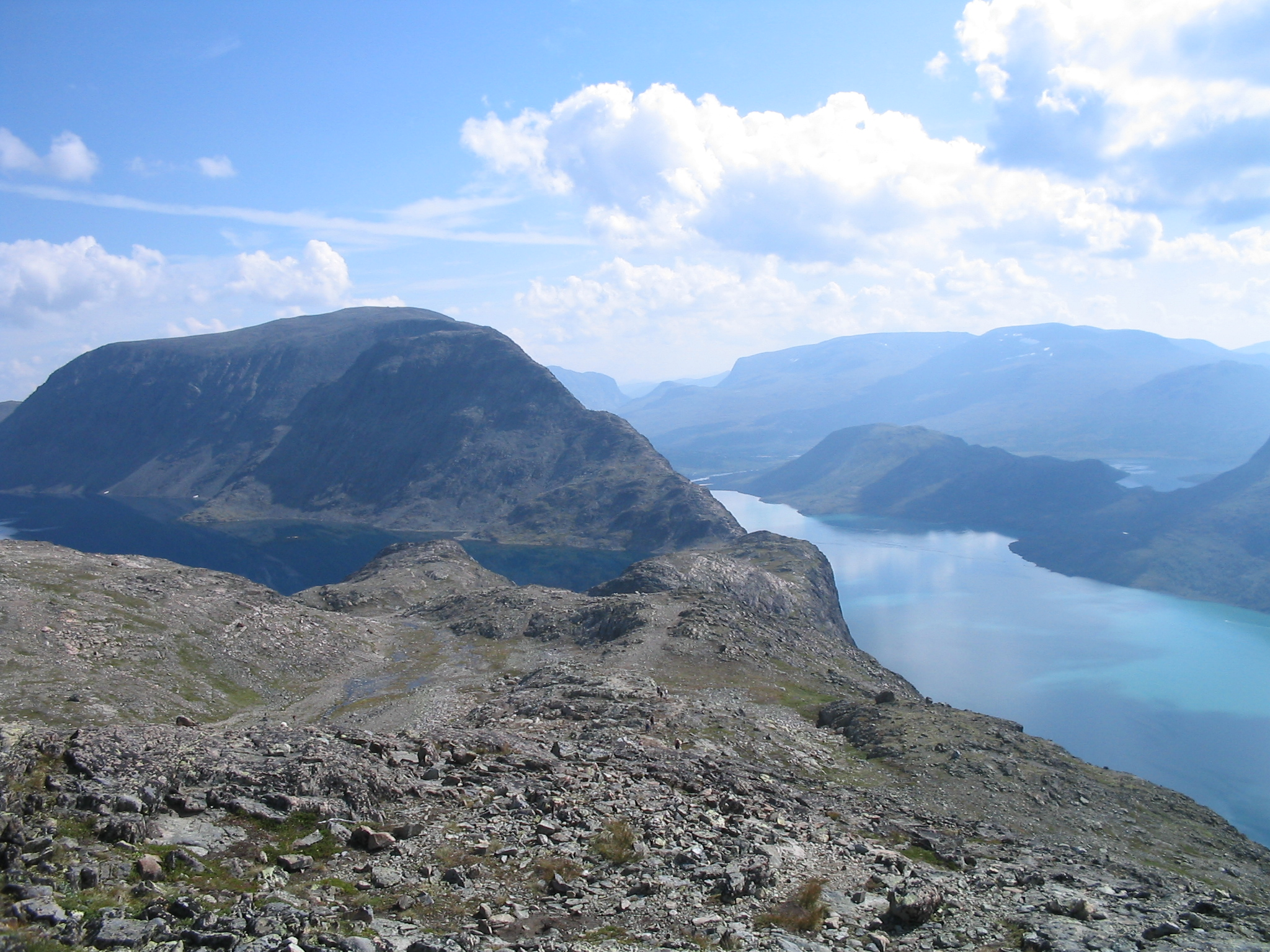 Besseggen, a mountain in Jotunheimen